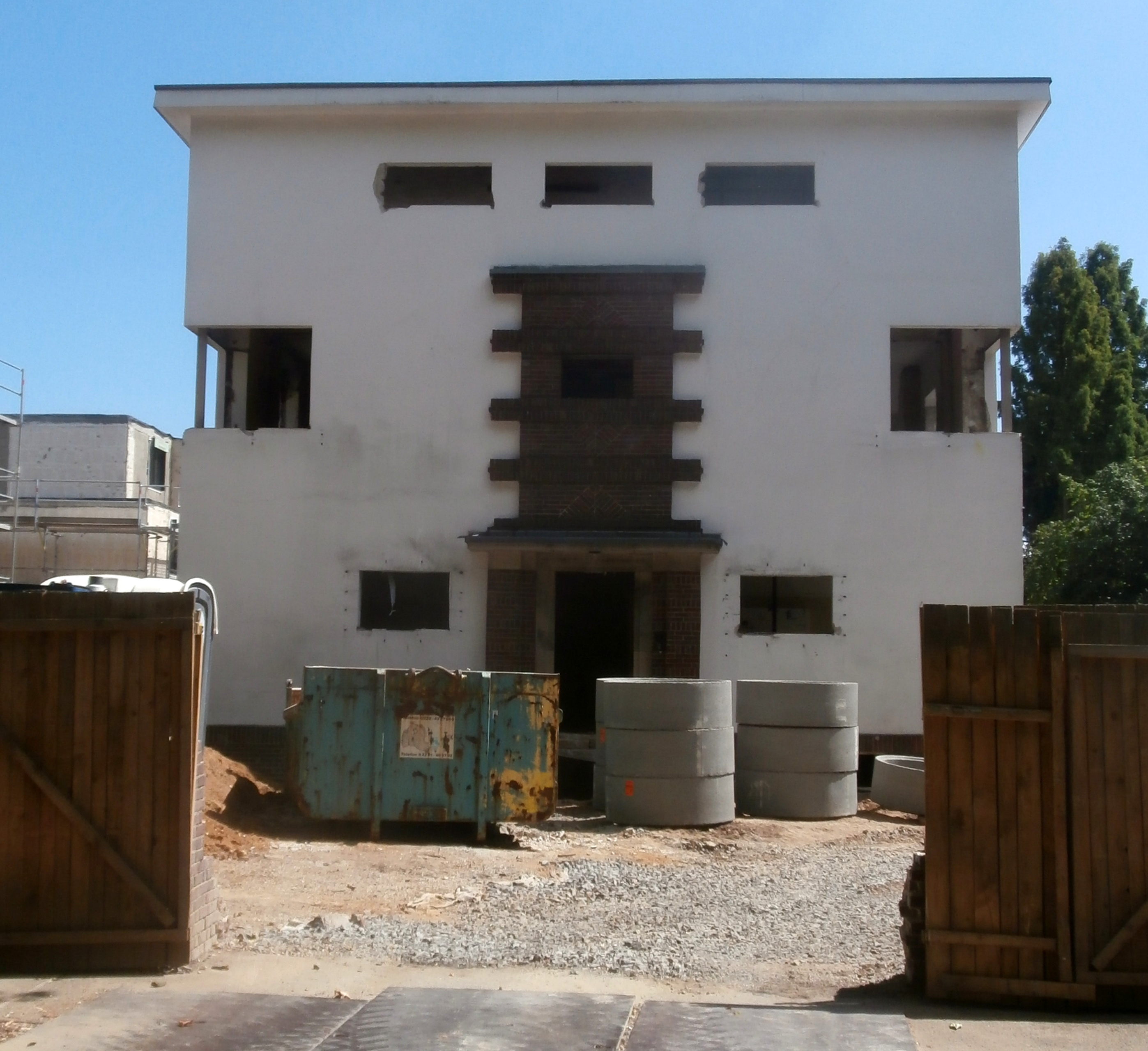 Ehemalige Residenz der Botschaft von Bulgarien (während einer Sanierung), Am Arndtplatz 8, Godesberg-Villenviertel, Bad Godesberg